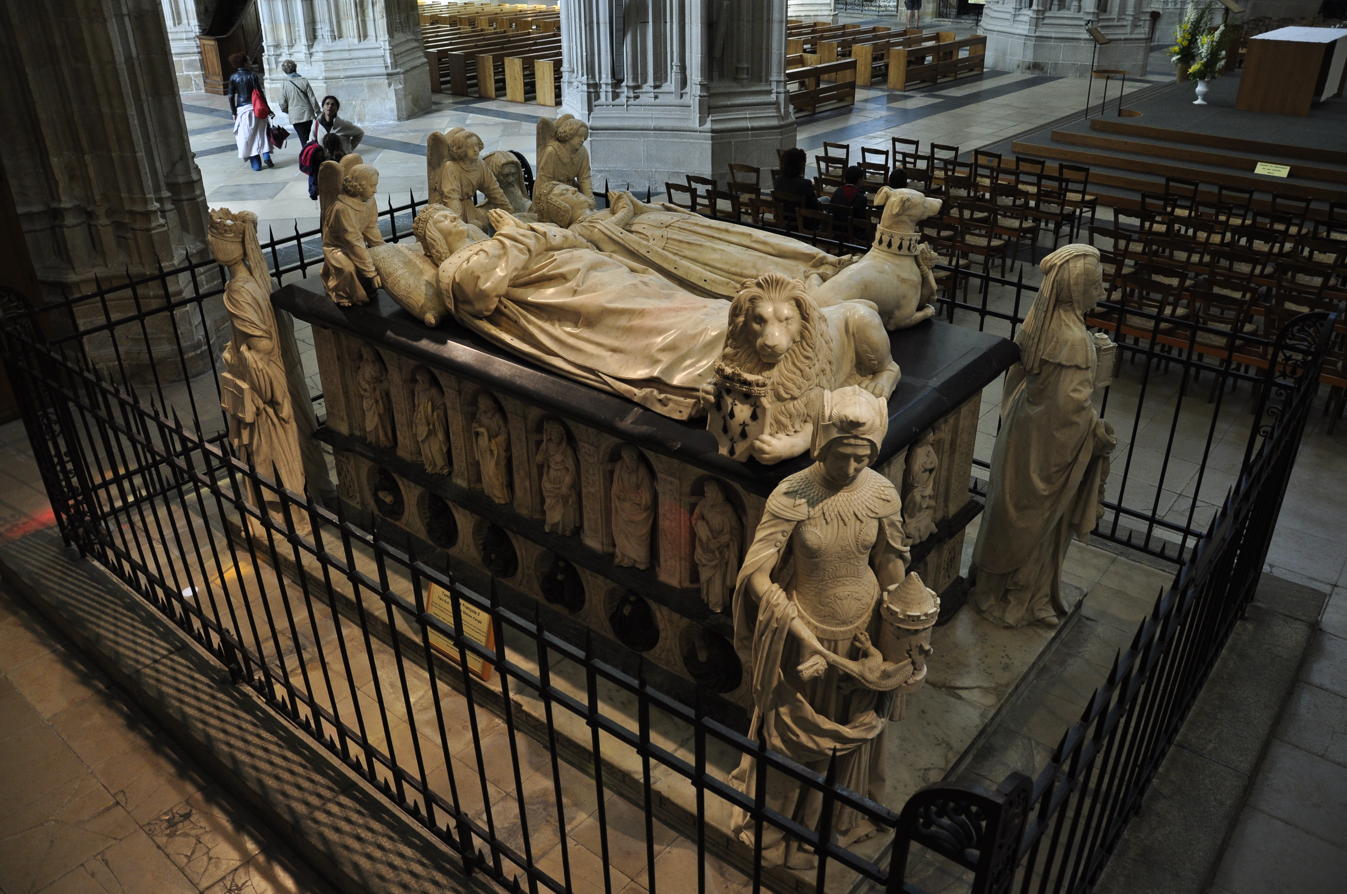 Cathédrale Saint-Pierre de Nantes (Loire-Atlantique, France) .